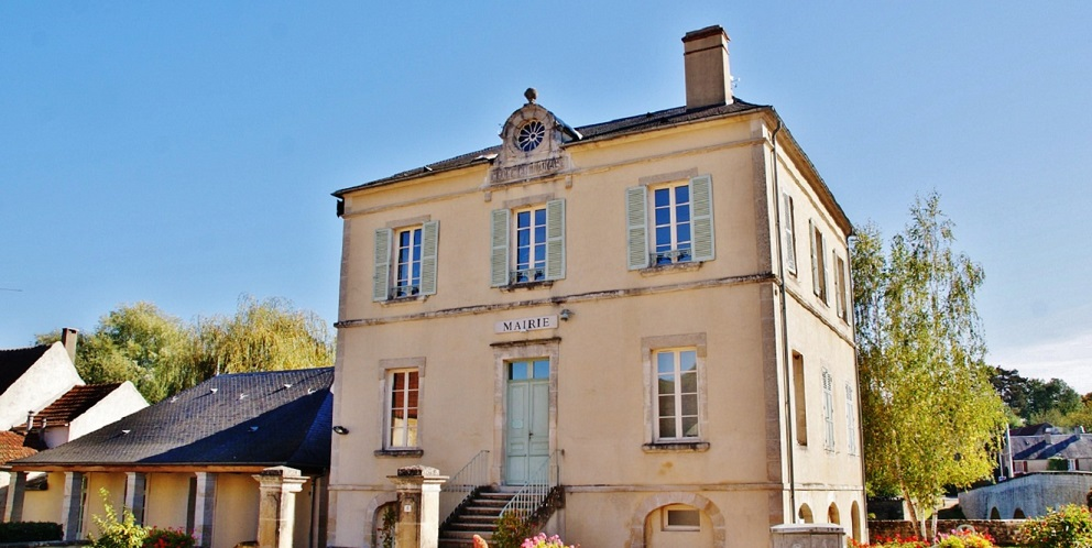 La Mairie et les anciennes halles.